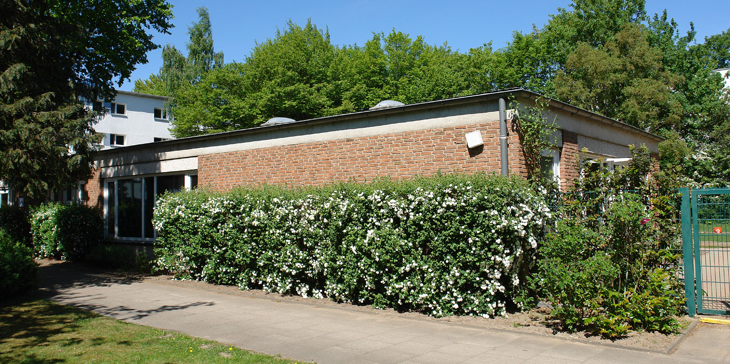 Kath. St.-Hedwig-Kirche der Pfarrgemeinde St. Raphael. Bremen, Kurt-Schumacher-Allee 62. Kindergarten Das abgebildete Objekt ist ein geschütztes Kulturdenkmal in der Freien Hansestadt Bremen, mit der Nr. 0679 beim Landesamt für Denkmalpflege registriert.